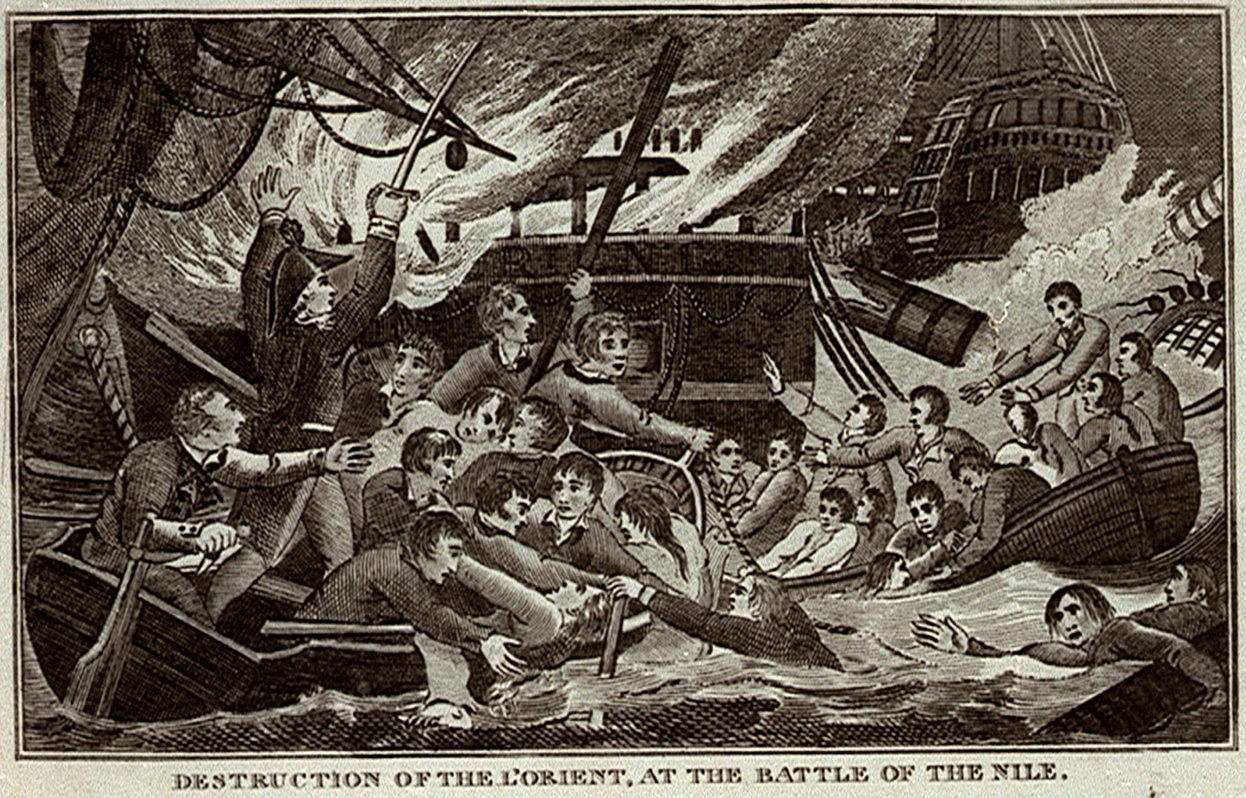 Équipage du vaisseau amiral l'Orient qui évacue le navire en feu peu avant son explosion à la bataille d'Aboukir (1798). Gravure anglaise.